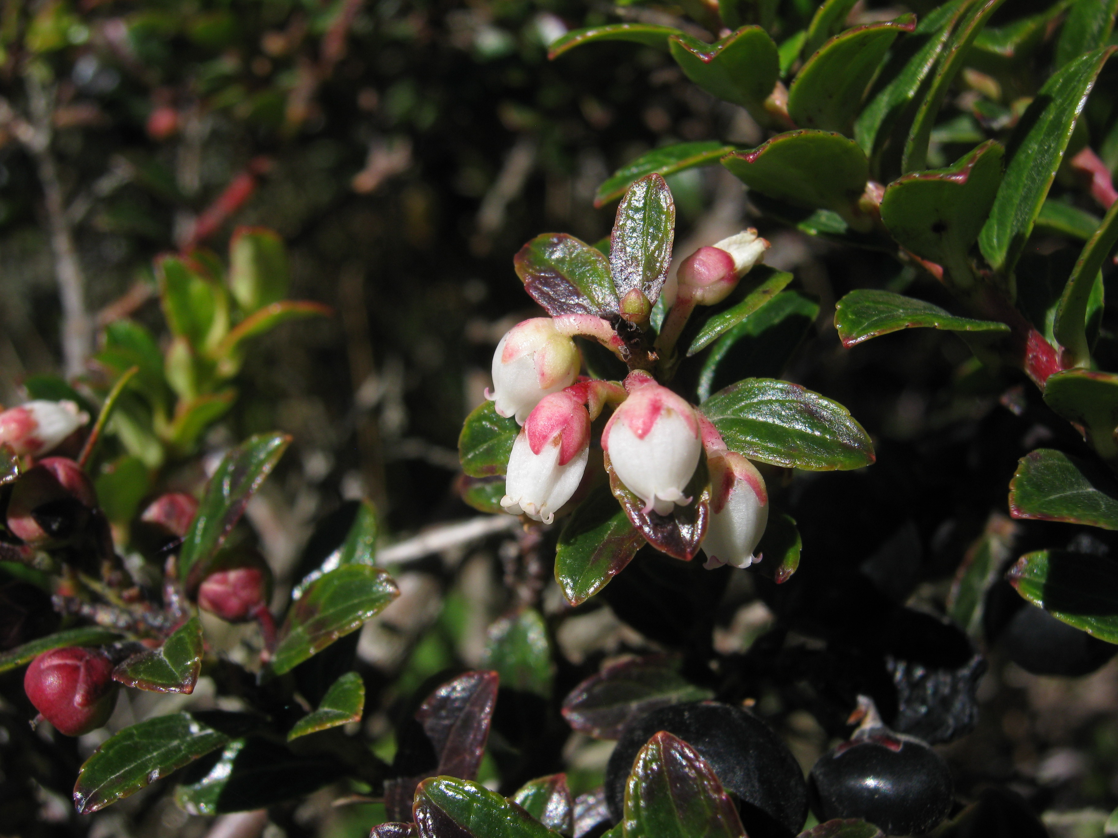 Fotos tomadas en trinidad, Dota